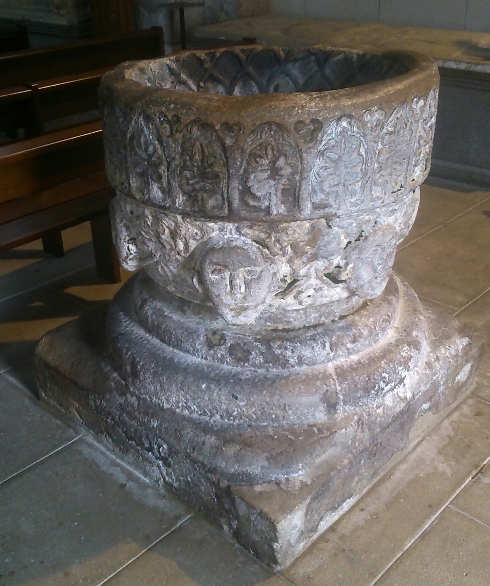 Cuve baptismale monolithe de l'Abbaye Saint-Magloire de Léhon (côtes d'Armor)